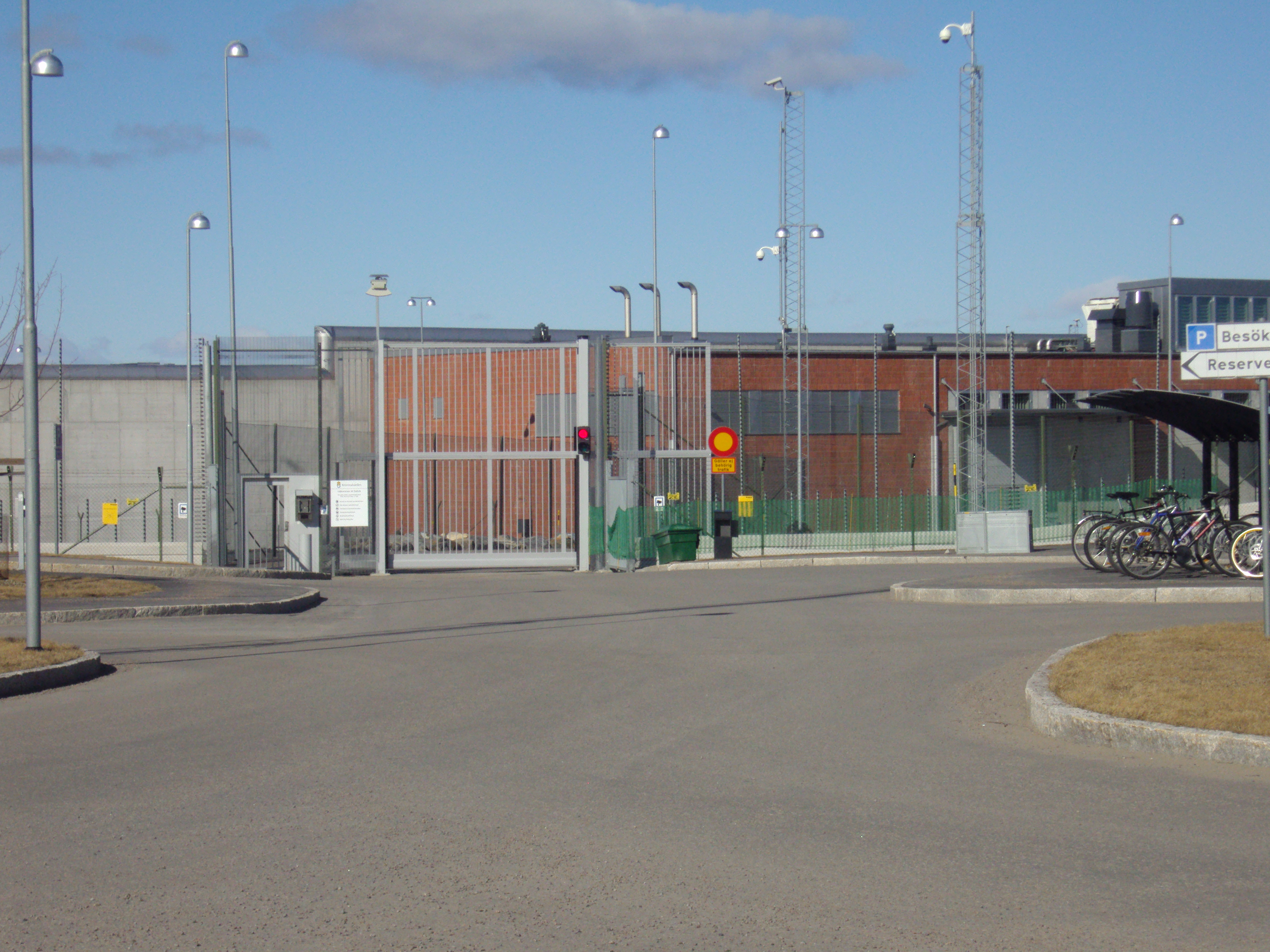 Anstalten Saltvik, Härnösand prison